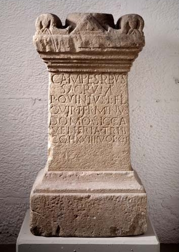 Altar mit Weihinschrift für die Campestres (Schutzgöttinnen des Exerzierplatzes), Benningen am Neckar. Original: Römisches Lapidarium Stuttgart. Abbildung: Foto des Originals aus Museum digital.